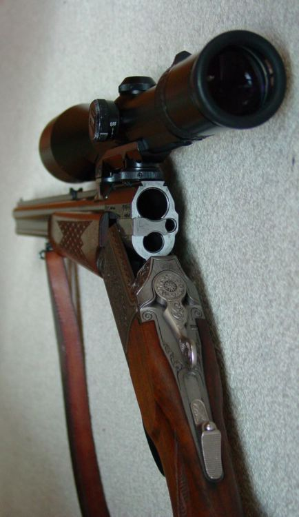 Foto eines Bockdrillings, geöffnet d. h. mit abgeknickten Läufen.